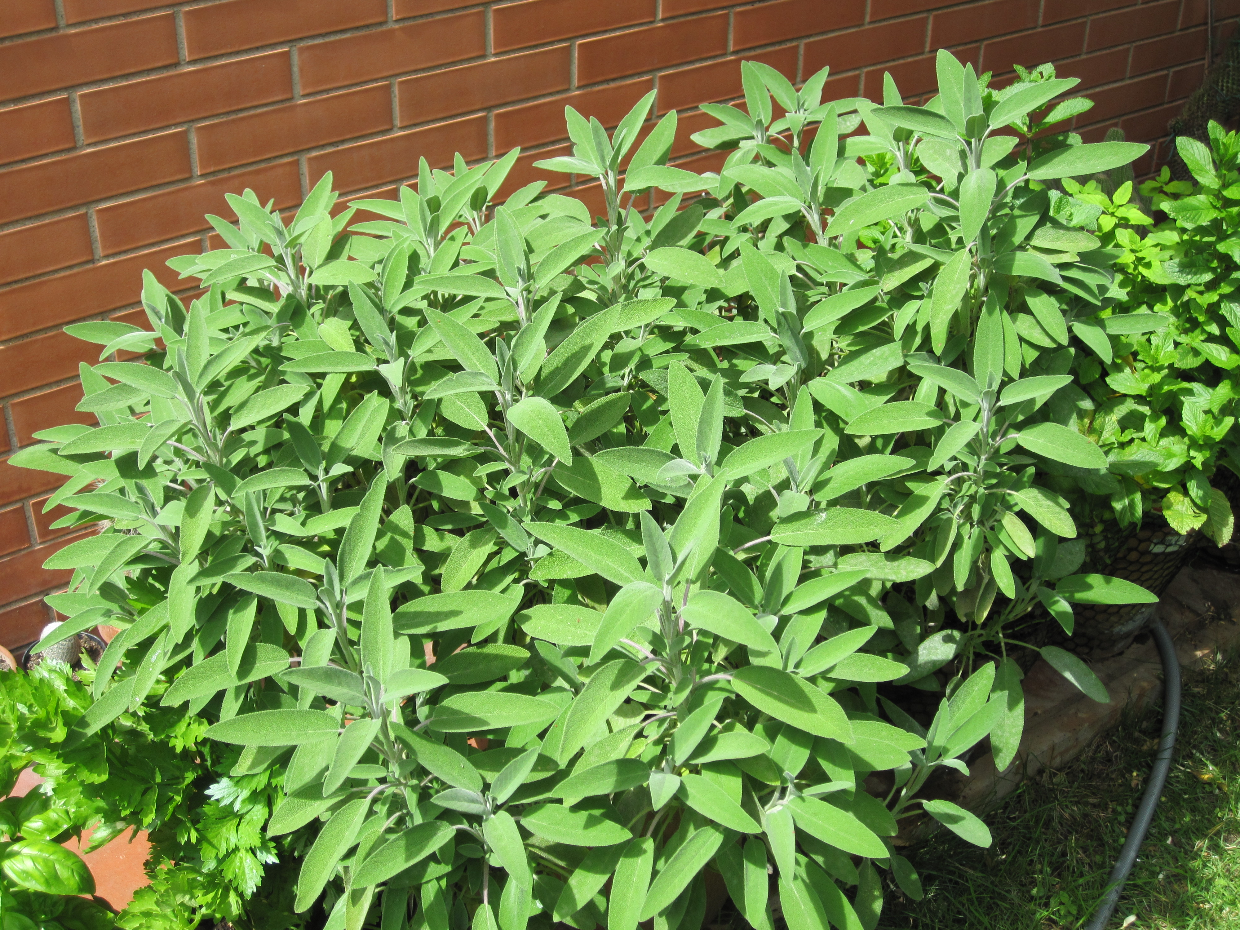 Una pianta di salvia officinalis